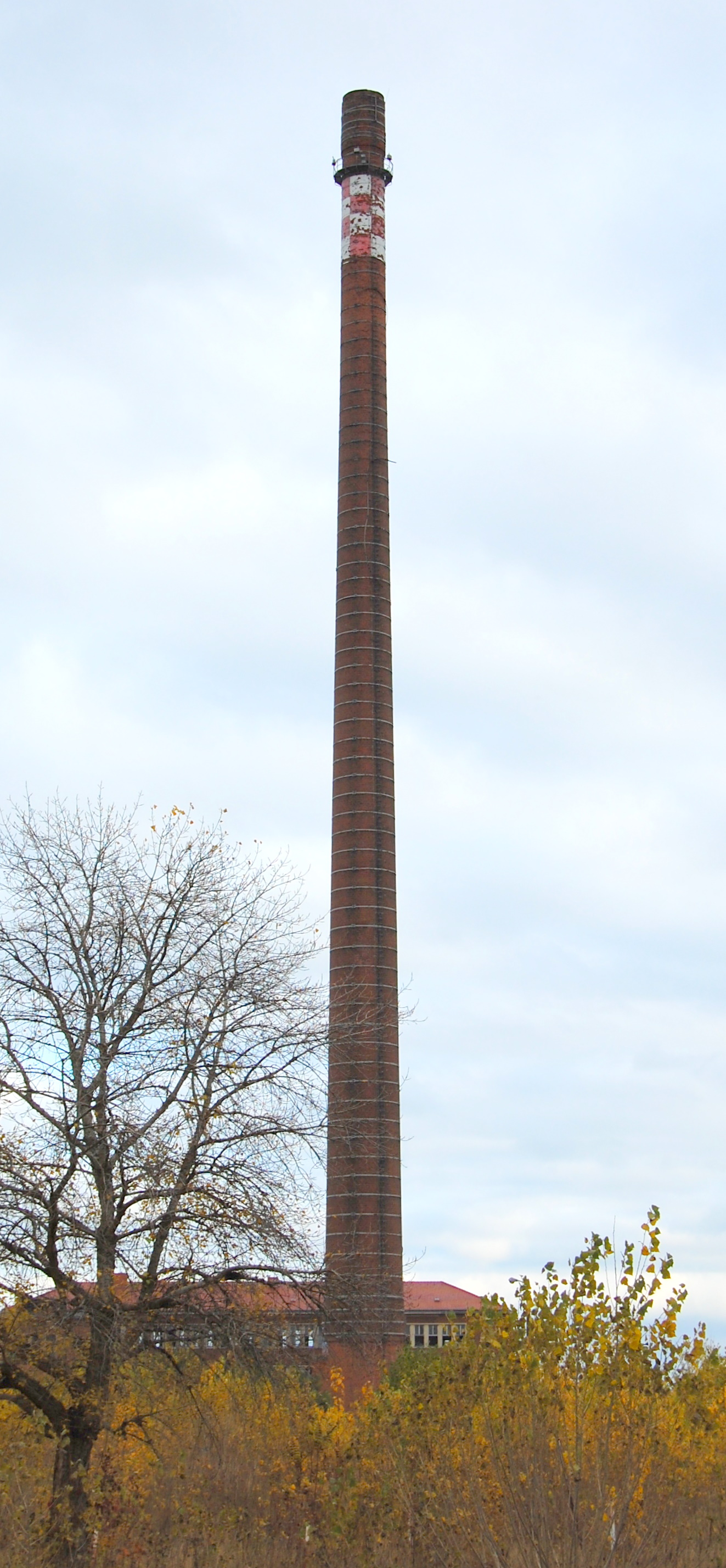 Langer Heinrich, Schornstein in Magdeburg-Buckau (Friedrich Krupp AG Grusonwerk, 1921/22 errichtet, am 28. Oktober 2009 gesprengt)